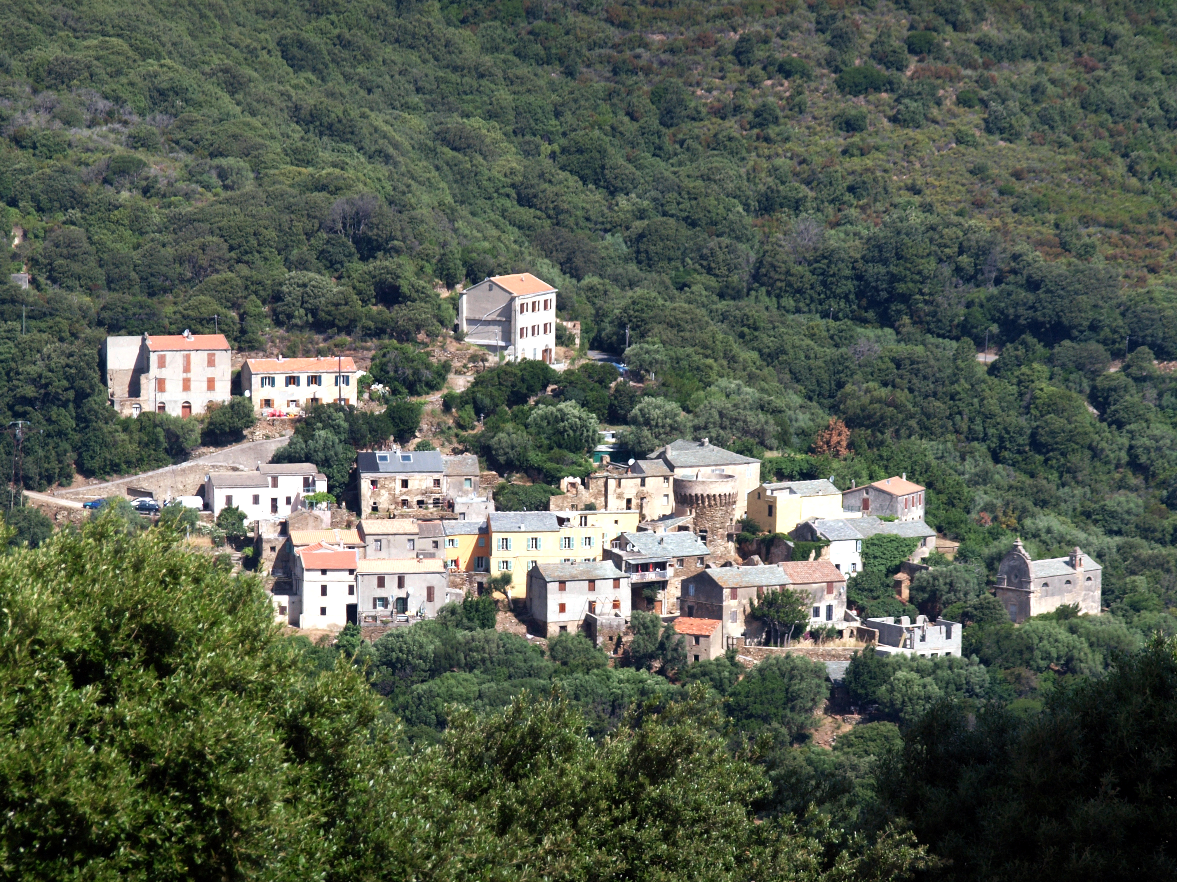 Ersa (Corse) - Poggio, ancien village